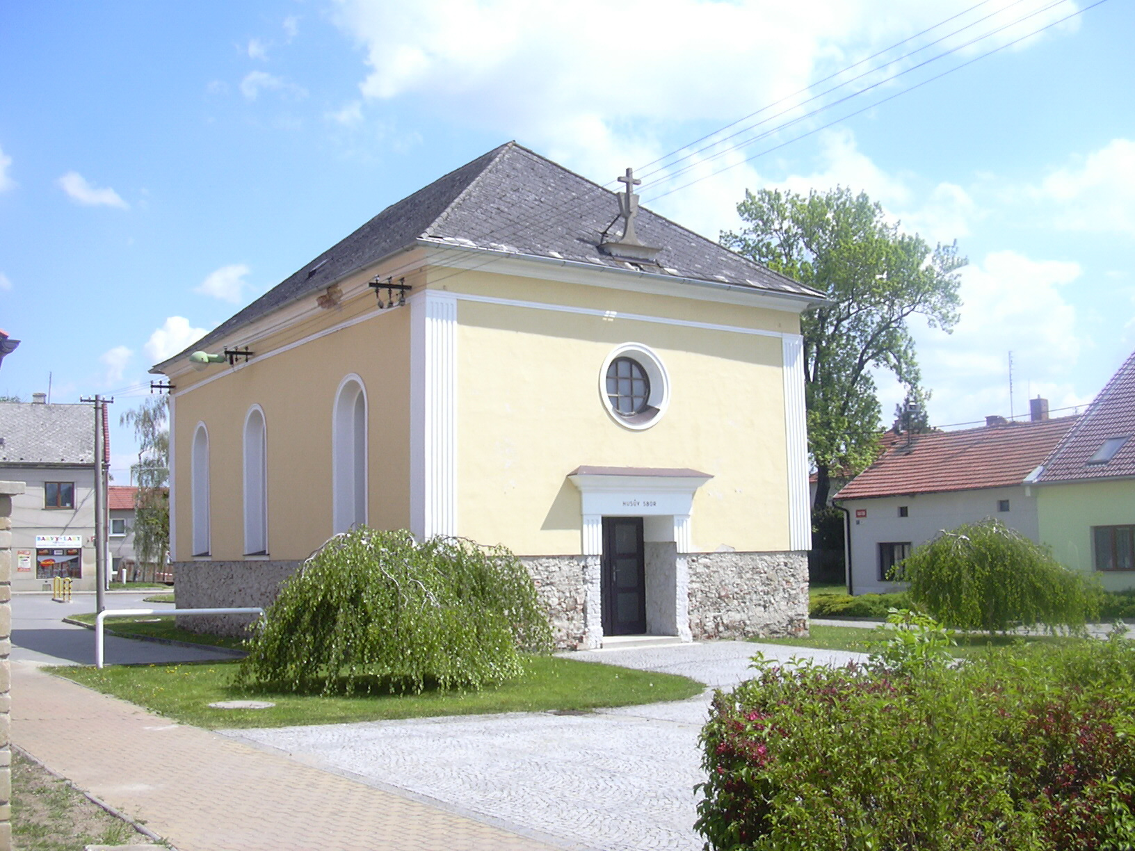 Synagoga (Ivanovice na Hané- Czech republic)